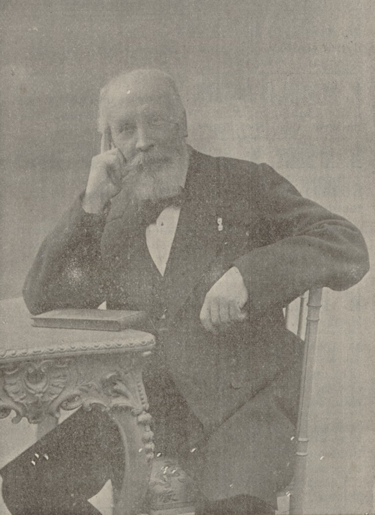 Auguste Tolbecque par Eugène Pirou